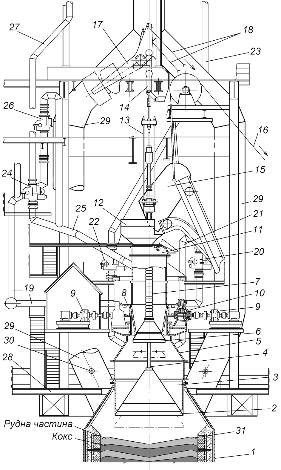 Завантажувальний пристрій конусового типу доменної печі. Зроблено на основі кількох малюнків у різноманітних підручниках з доменного виробництва та фото колошникових пристроїв доменних печей з інтернету.